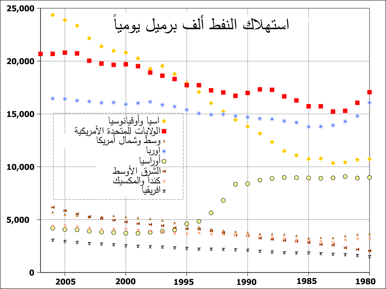 أستهلاك النفط منذ 1980 والى 2007